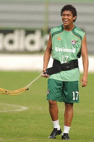 Dieguinho durante passagem pelo Fluminense